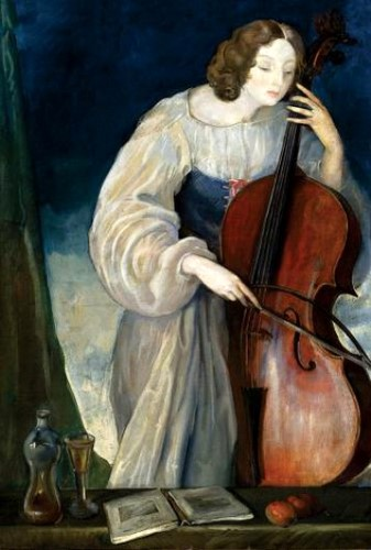 Portret Ireny Lorentowicz (1908-1985), malarka i scenograf.